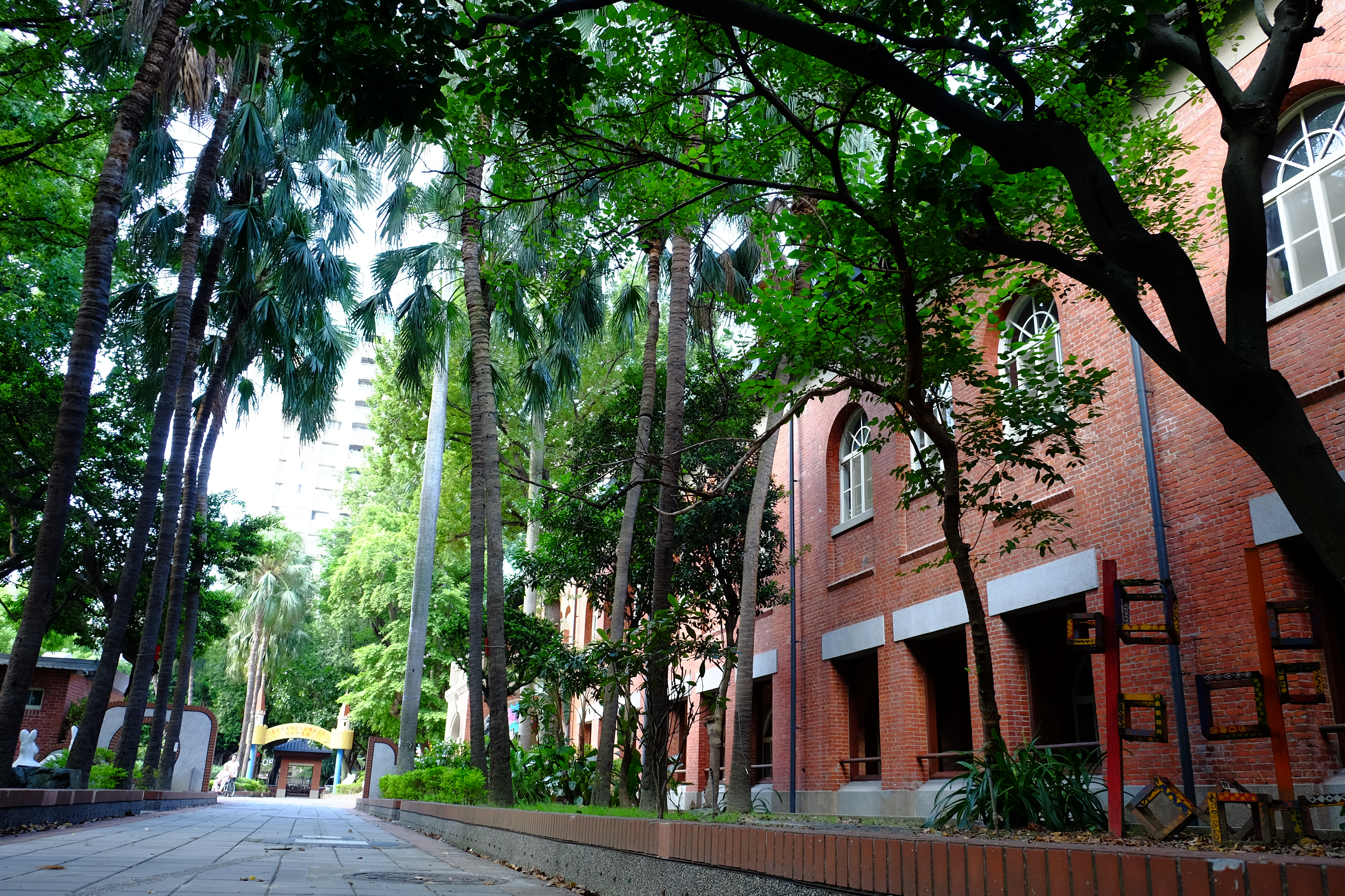 臺北市大同區日新國民小學 Taipei Municipal Rixin Elementary School